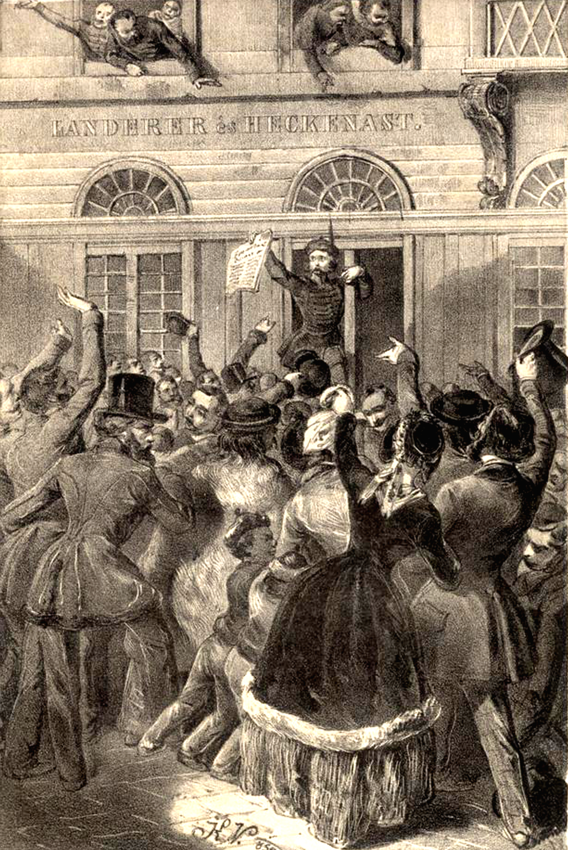 Vinzenz Katzler: die Pesther Studenten machen die Wünsche des Volkes bekannt. 1848. március 15. a szabad sajtó ünnepe - Landerer nyomdánál. Pest. "A nemzeti dalt két nappal előbb, március 13-án írtam, azon lakomára, melyet az ifjúság március 19-én akart adni, mely azonban az eddigi események következtében szükségtelenné válván, elmarad. Míg én az egyik asztalnál a nemzeti dalt írtam, feleségem a másik asztalnál nemzeti fejkötőt varrt magának. - Petőfi Sándor, Pest, március 17. 1848"